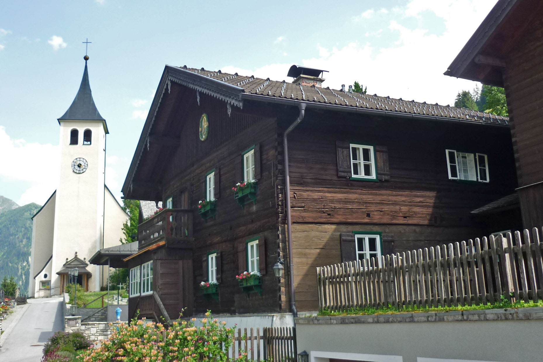 Pfarrhaus Hüttschlag